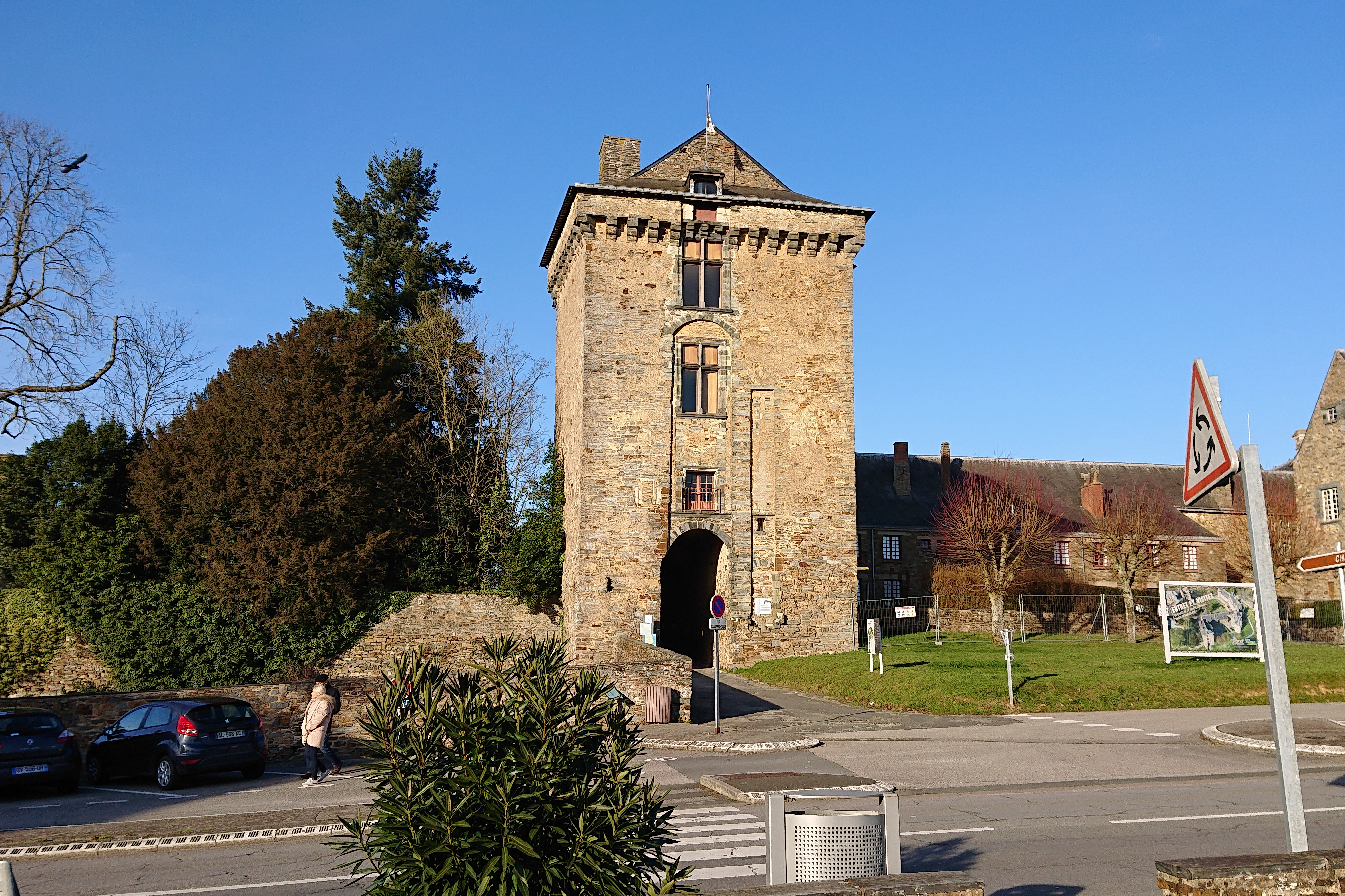 Pavillon des Champs du Château de Châteaubriant, France.